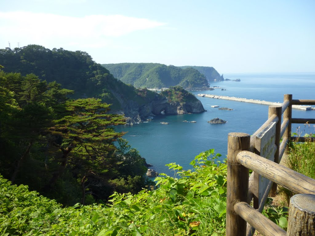 熊の鼻展望台から北を臨む